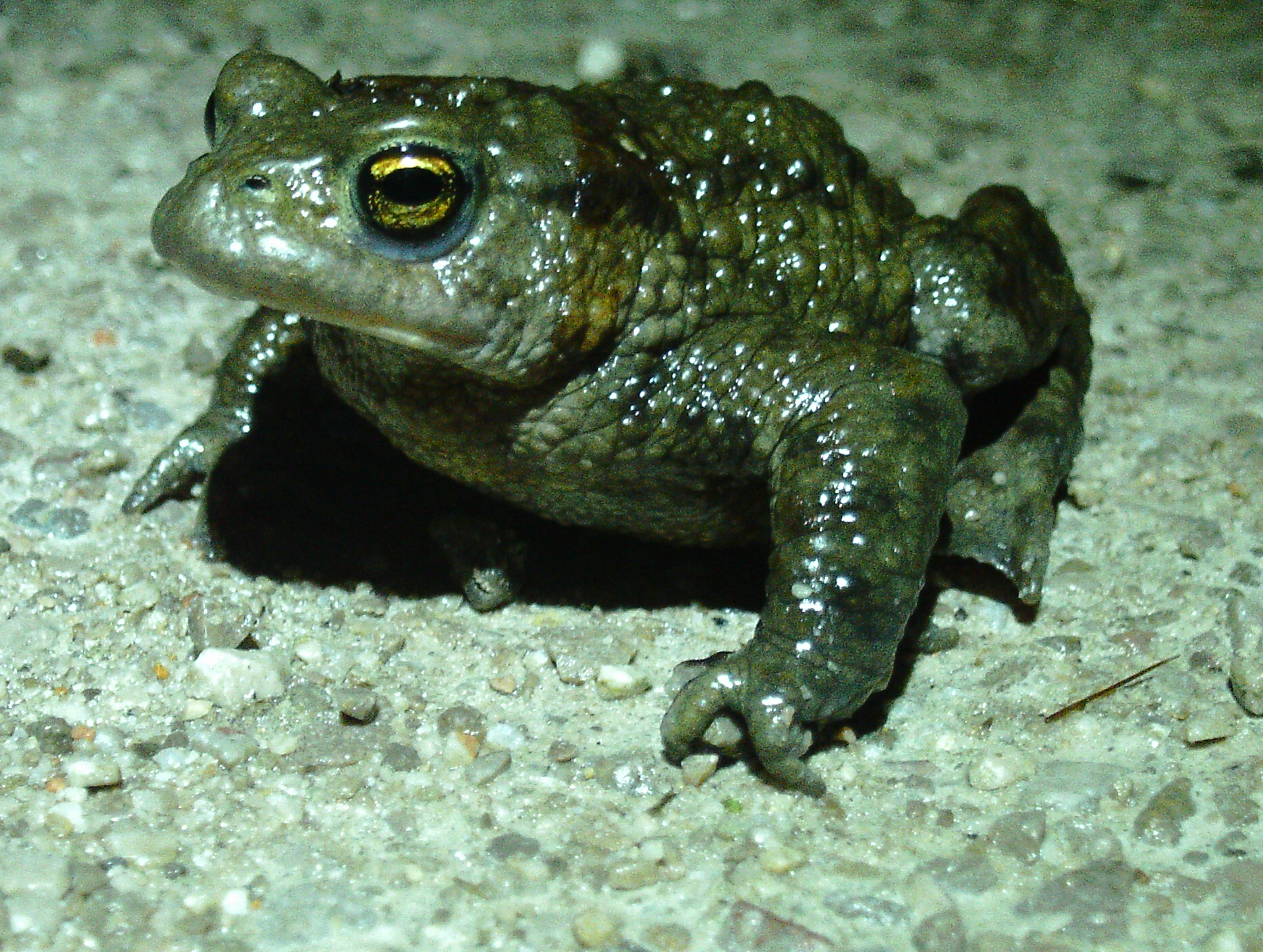 Crapaud commun Bufo bufo type vert foncé, pris avec éclairage led petzl tikka+ le 04/03/17 à Coudekerque Branche 59210 le long de l'A16